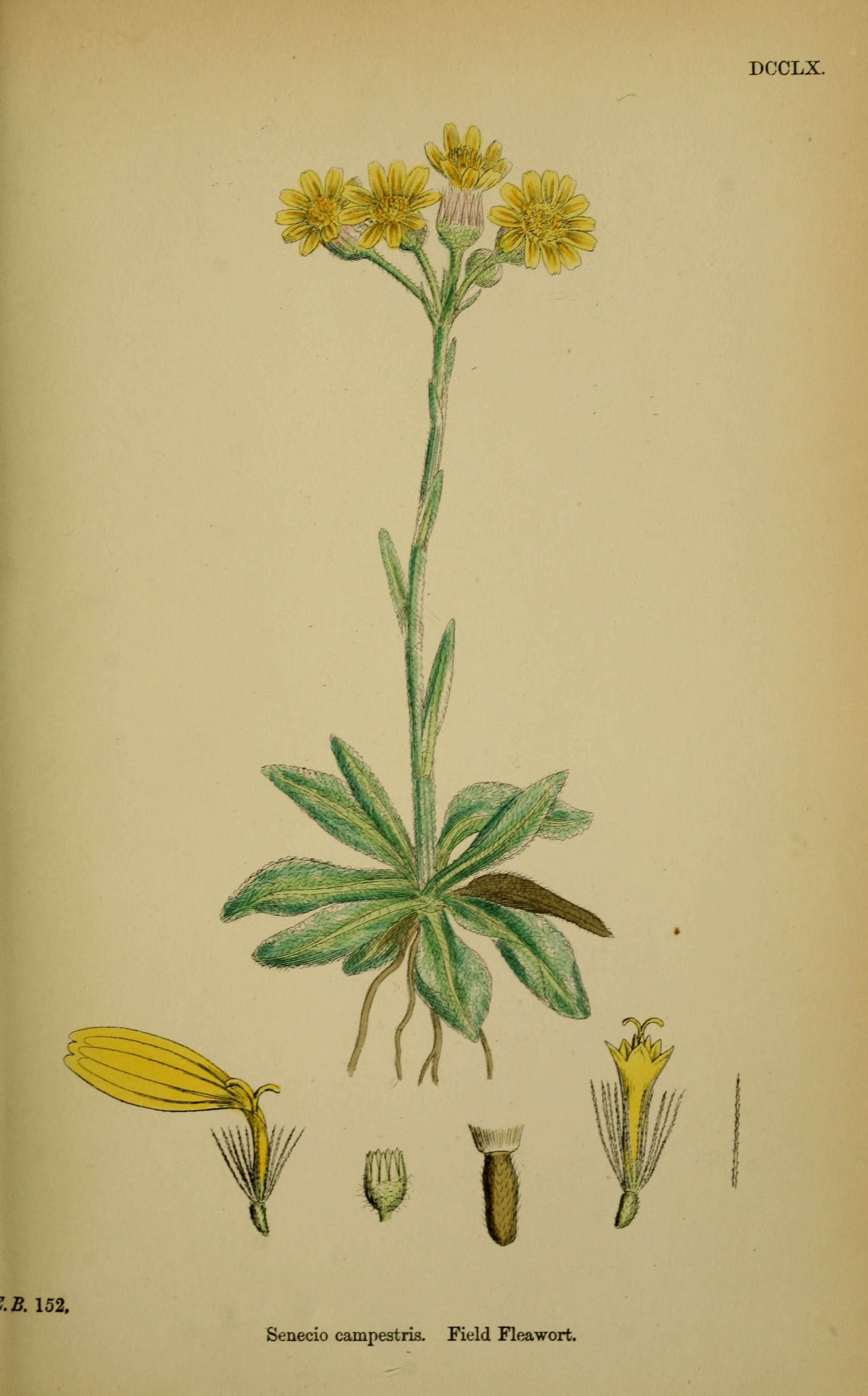 Legende: Ganze Pflanze. Strahlenblüte. Hülle, Blüten entfernt. Frucht, Pappus teilweise entfernt. Röhrenblüte. Pappushaar.